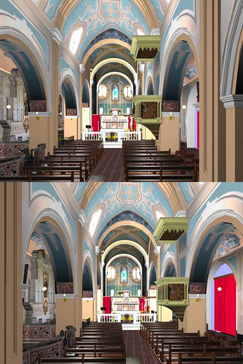 Coppia di fotogrammi ottenuti dalla restituzione effettuata con la tecnica della modellazione stereometrica